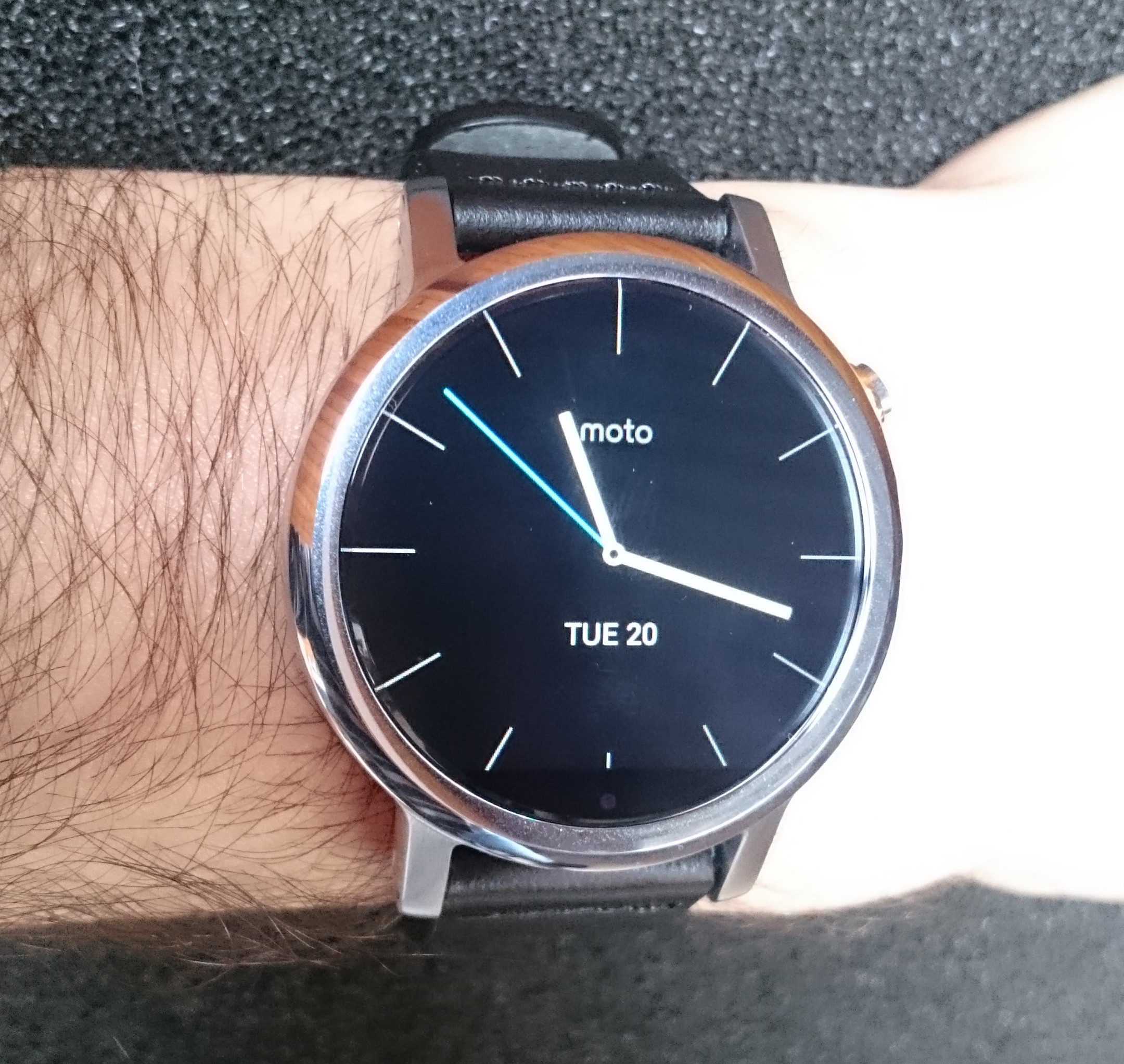 Bild der Moto 360 (2015) in der 42mm-Version.